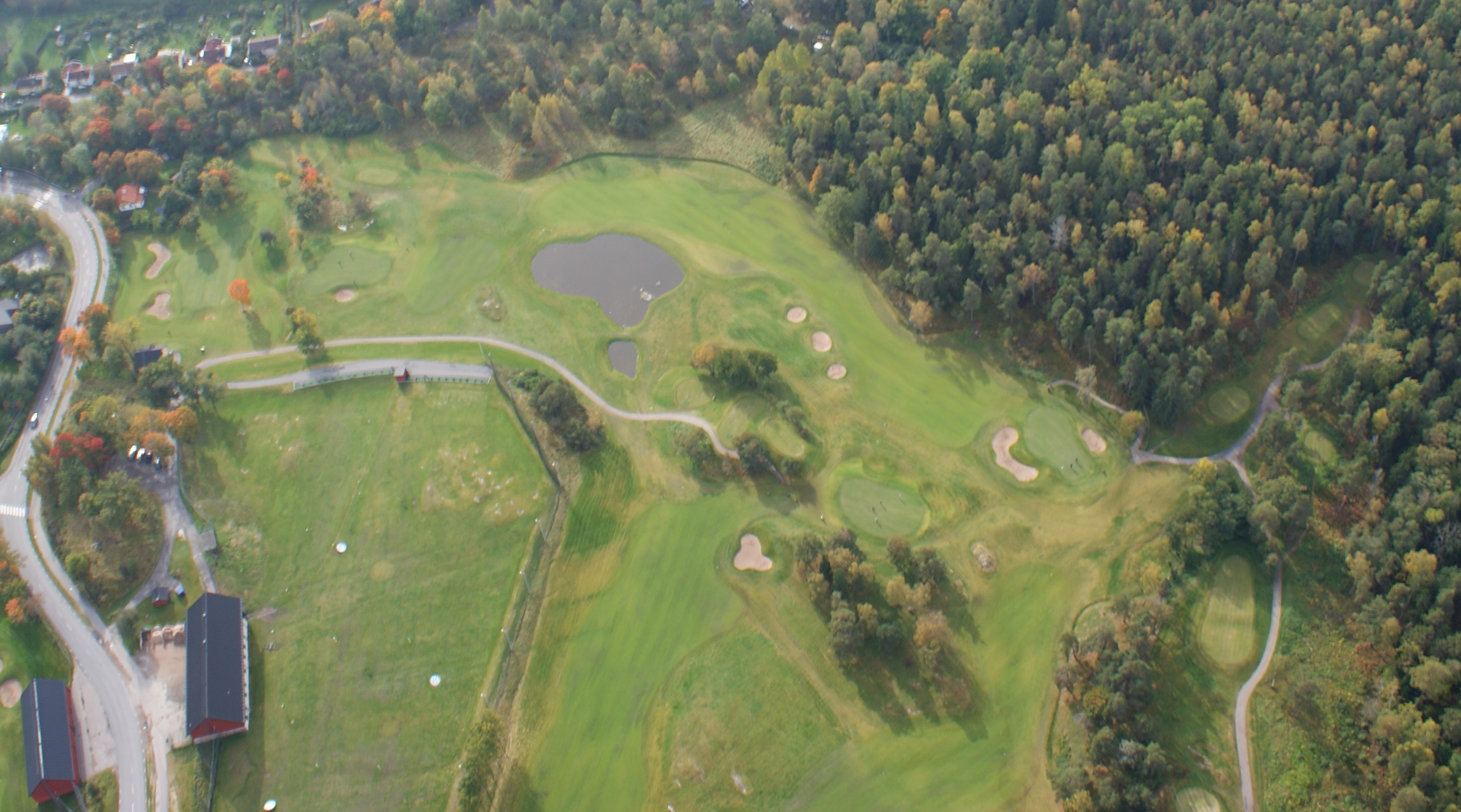 Lidingö Golfklubb sedd från helikopter.